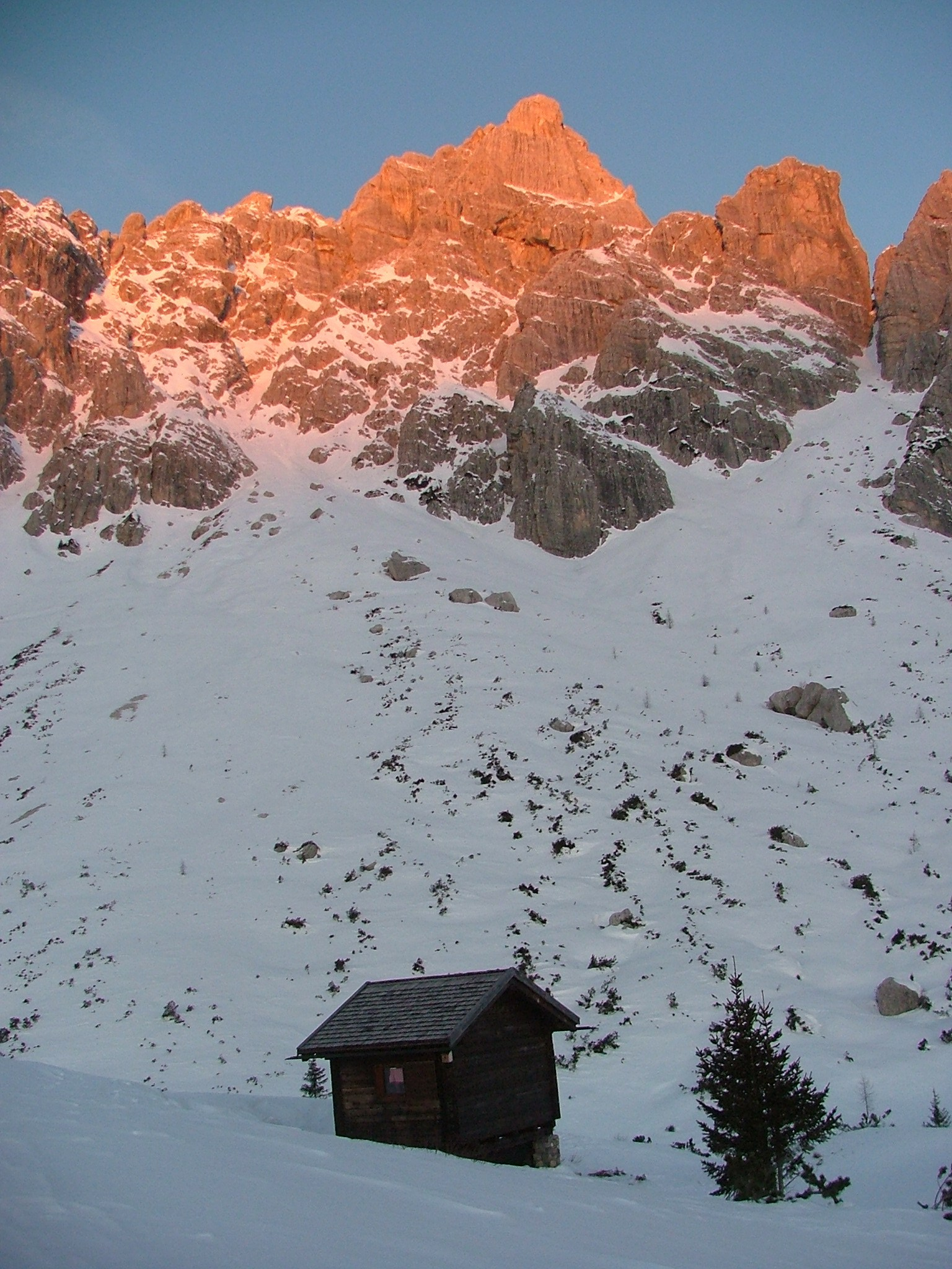 alba Rif. Ciareido sulle Marmarole, Lozzo di Cadore, Dolomiti, Belluno, Italy